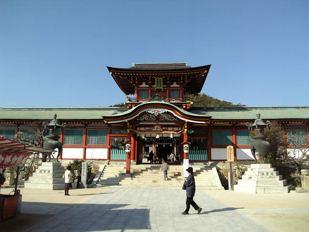 防府天満宮